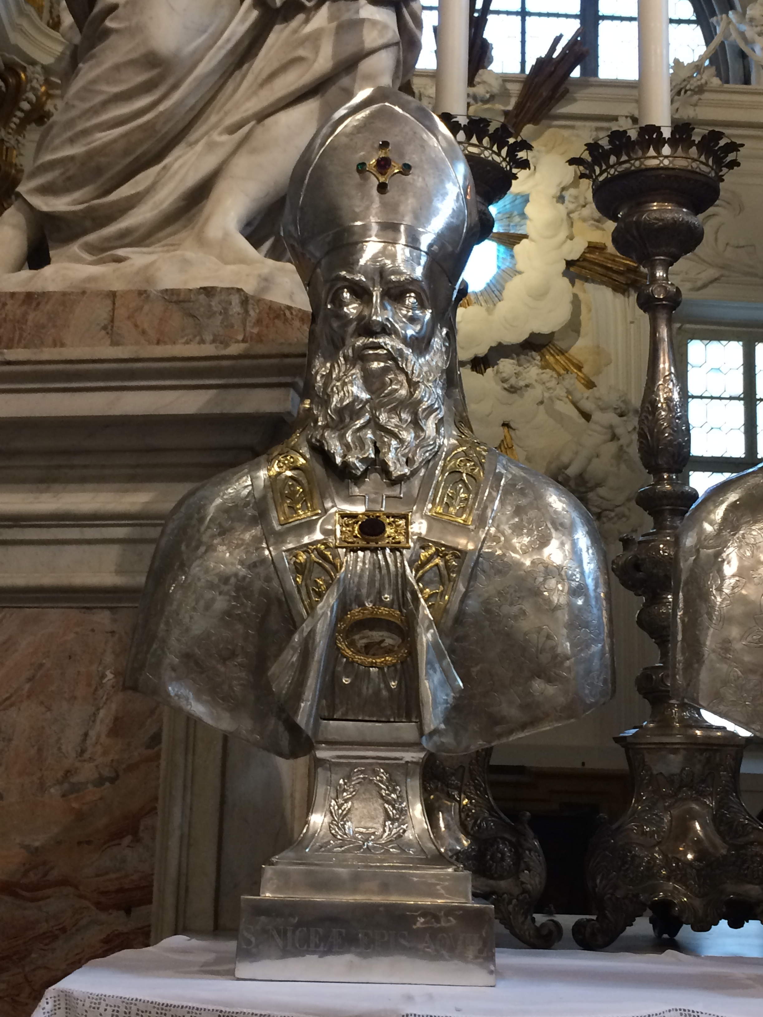 Duomo Udine - Busto con reliquie di San Niceta